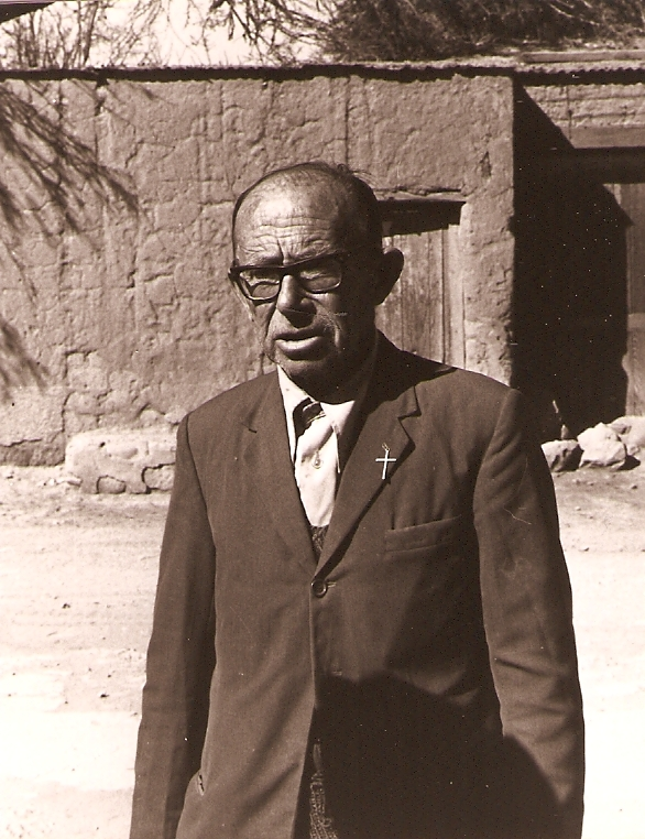 Le Père Le Paige en 1974 sur la place de San Pedro de Atacama